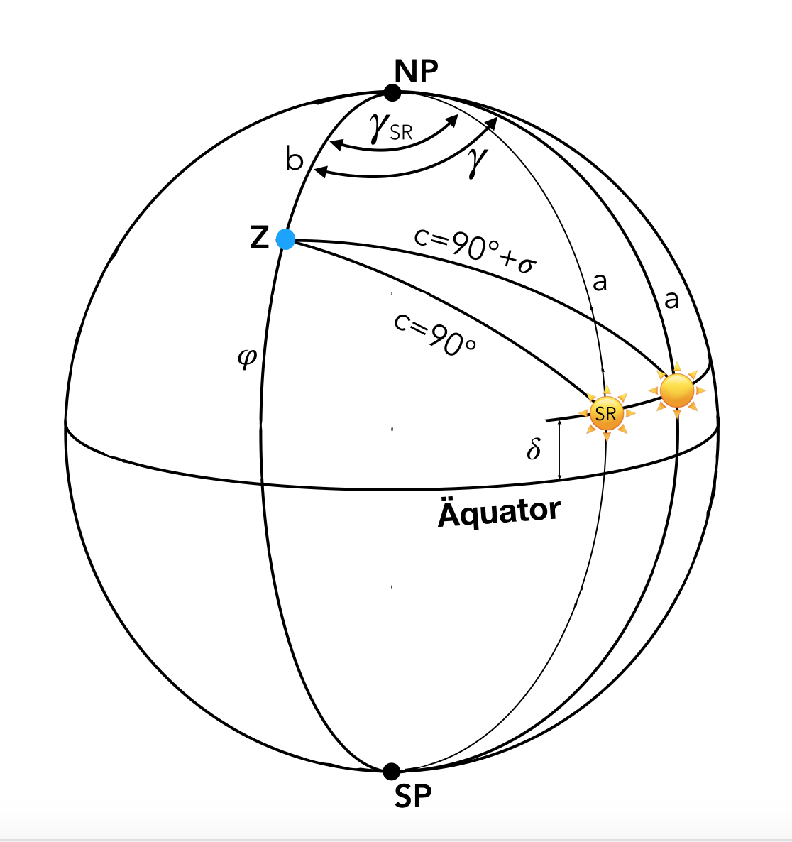 Himmelskugel mit der Sonne in der Dämmerung